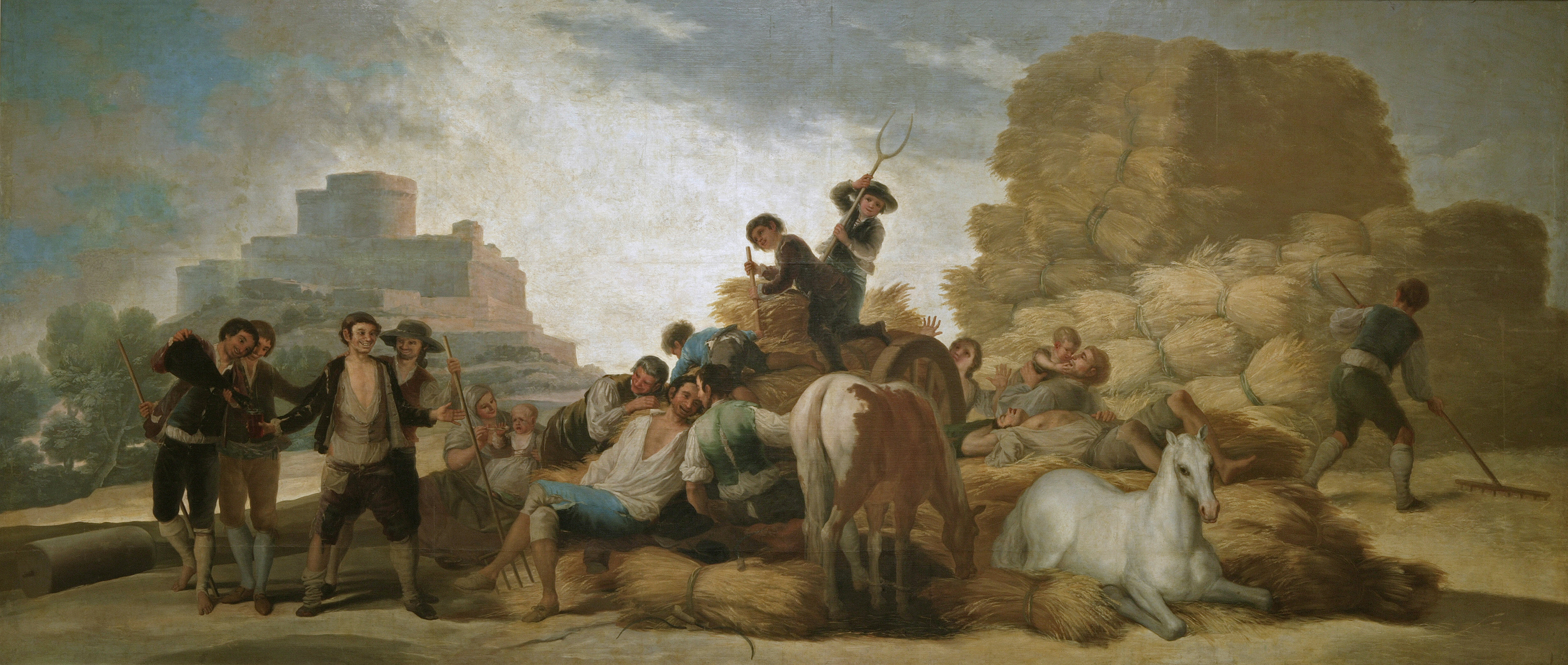 La era o el verano. Cartones para tapices. Óleo sobre lienzo, 276 × 641 cm. Madrid, Museo del Prado